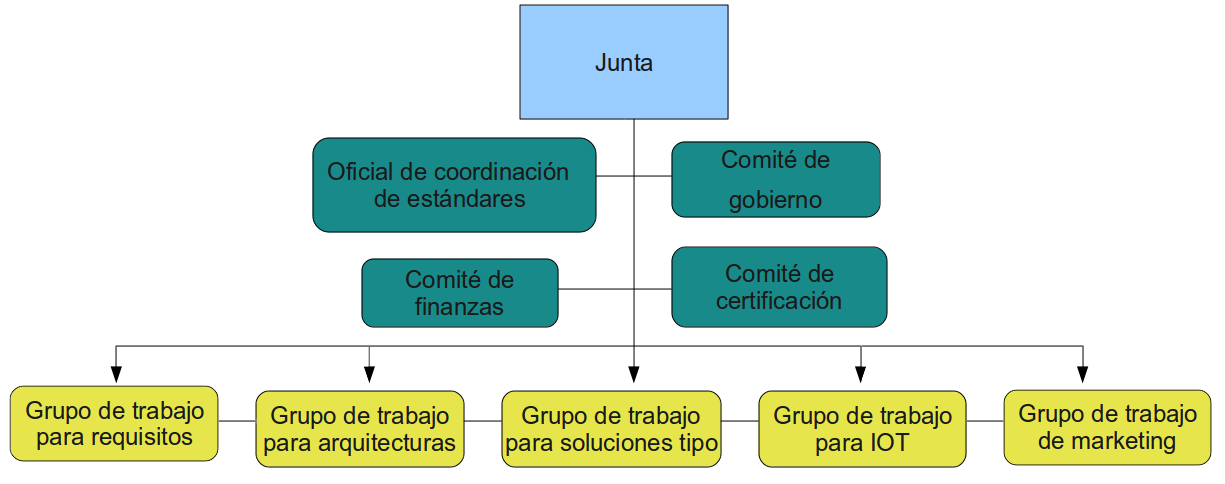 Diagrama de bloques de la organización del Open IPTV Forum